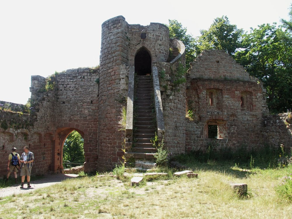 Neuscharfeneck, Ansicht des Torturms von innen. Datum: 17.7.2005 Fotograf: Peter Schmenger